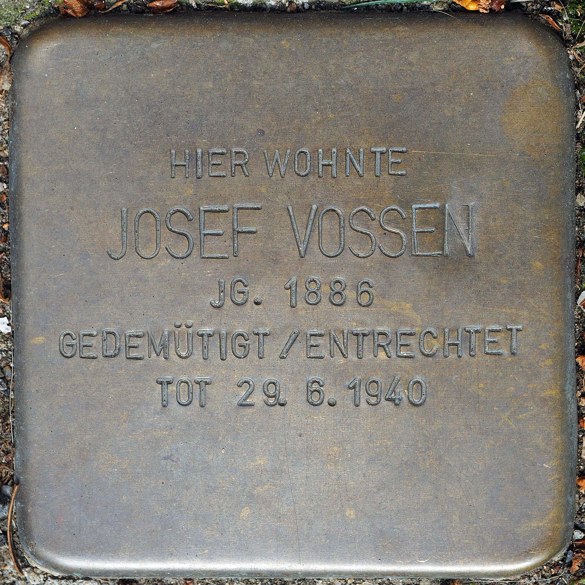 Stolpersteine GV: Vossen, Josef